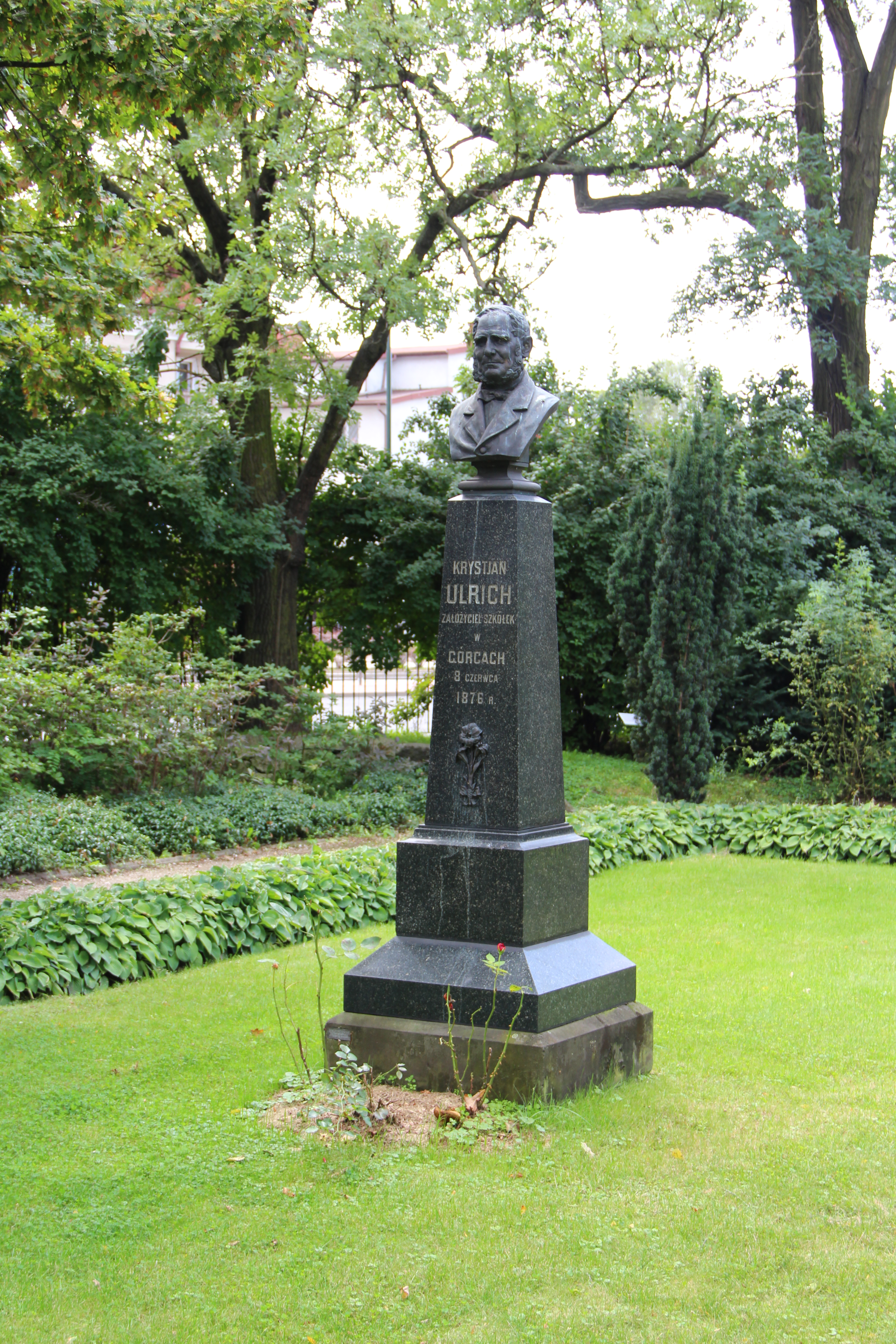 K. Ulrich statue in Ulrich Park in Warsaw